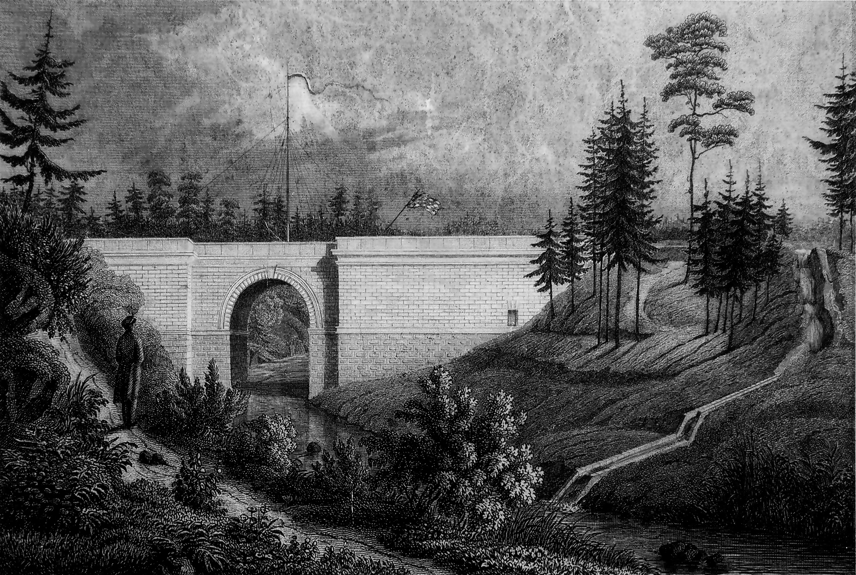 Кленце. Мост-акведук . С гравюры Александра Маркса (1845 г.)